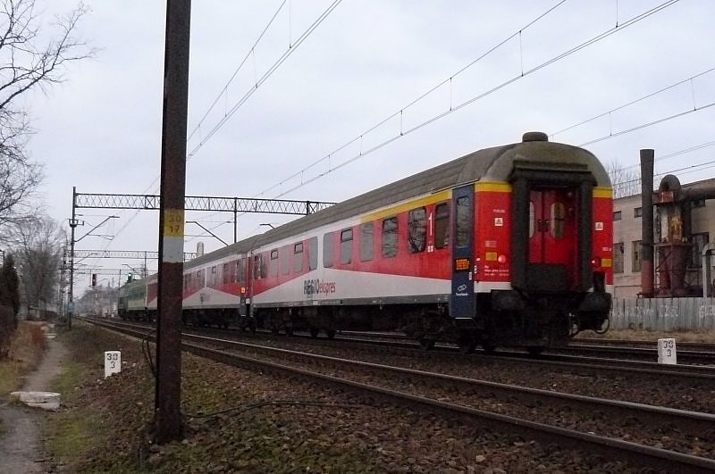 Un vagón de 1ª y 2ª clase de la compania regioexpress grupo pkp